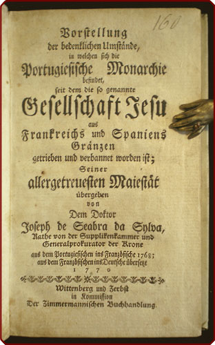 José Seabra da Silva (1732-1813), estadista português